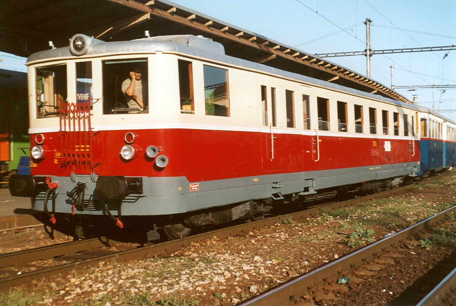 M 262.007 aus dem Jahr 1949 im Bahnhof Bratislava h.l.n.